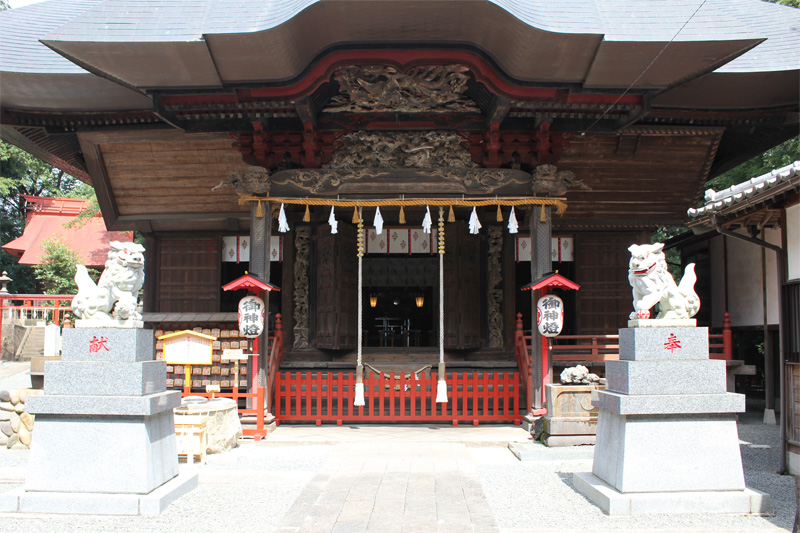 産泰神社・本堂